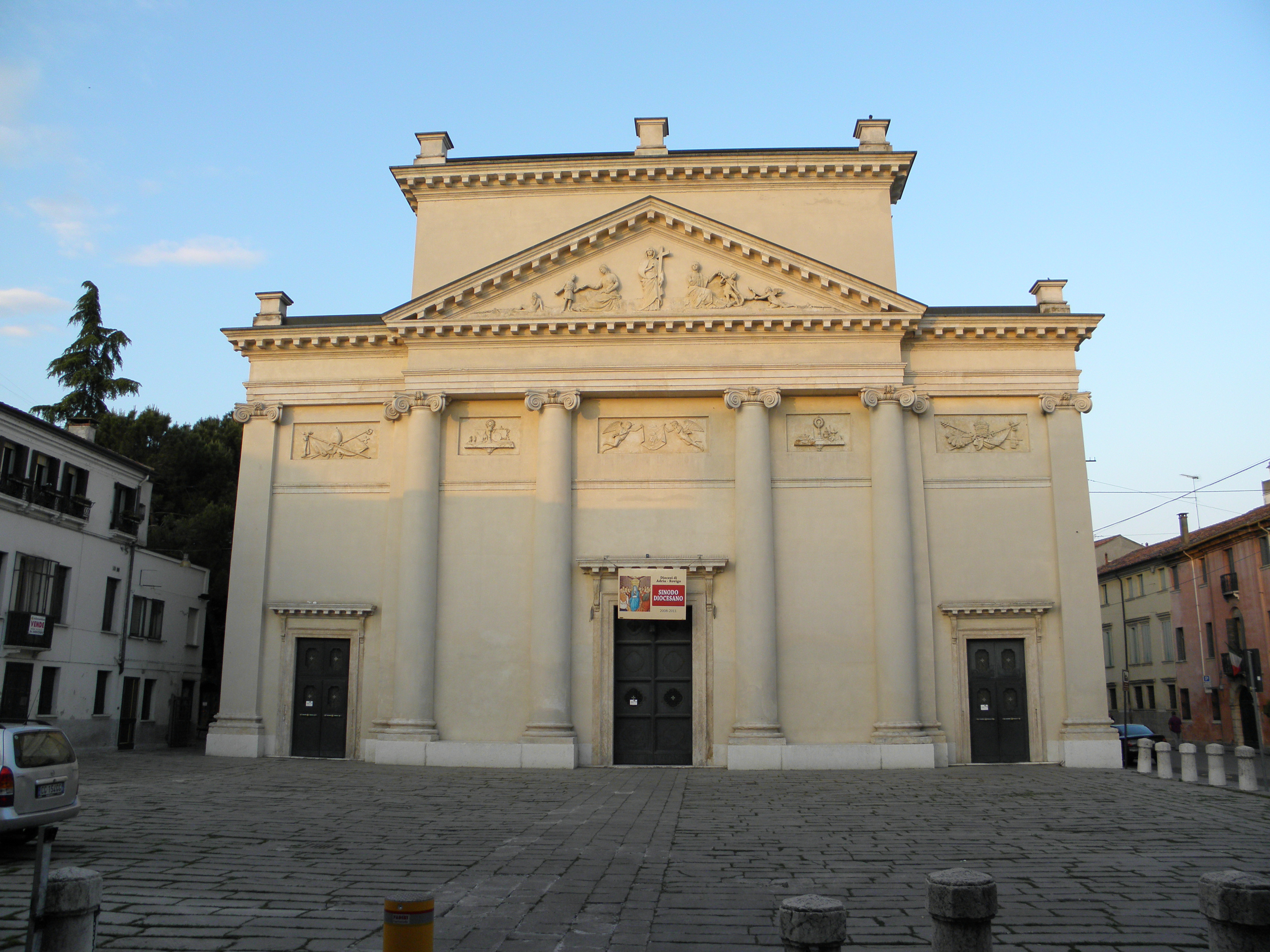 Rovigo: facciata della chiesa del Santi Francesco e Giustina.